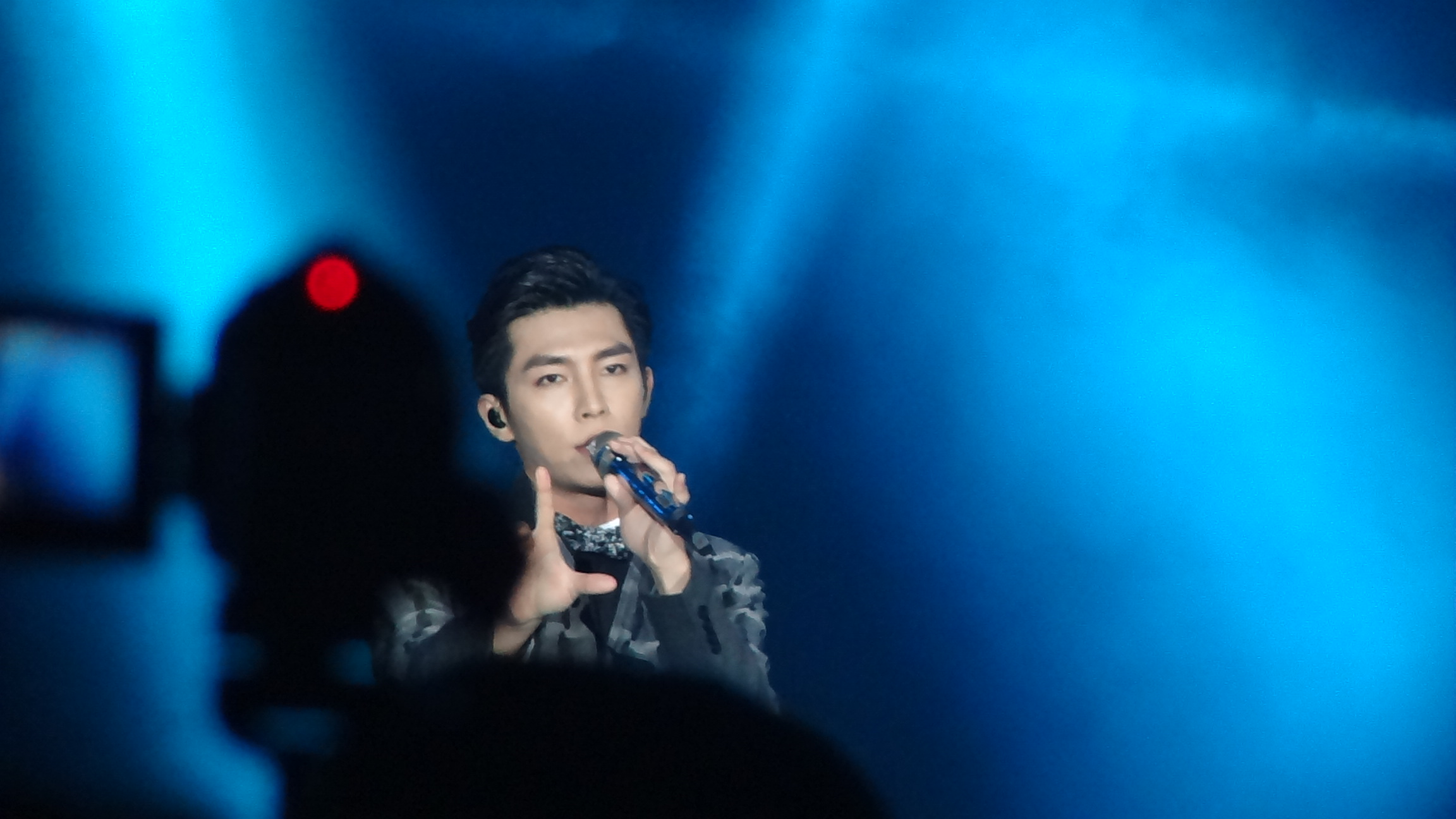 中文（台灣）: 炎亞綸在新北市歡樂耶誕城演唱。